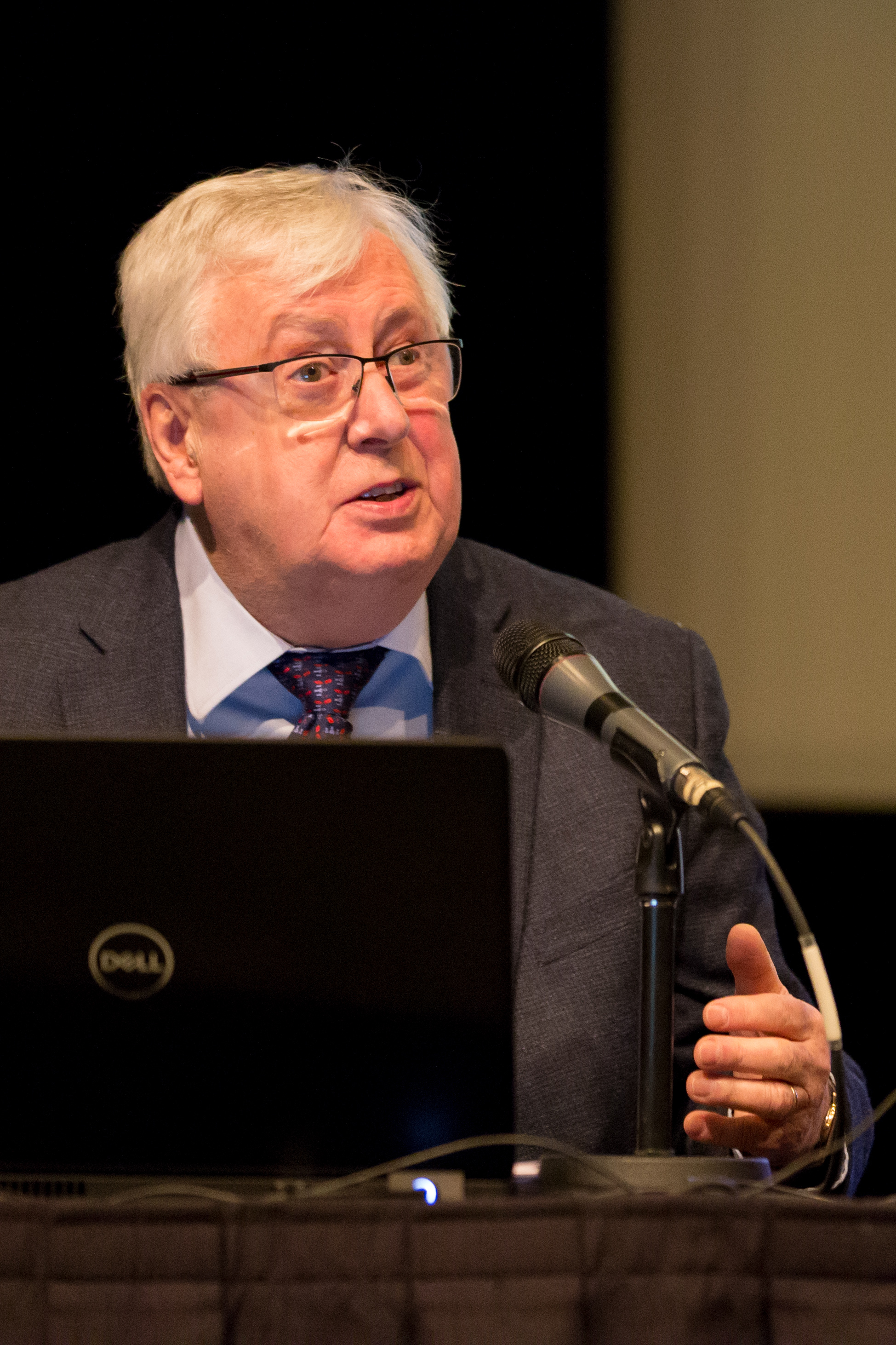 Portrait du bibliothécaire Marcel Lajeunesse lors d'une conférence donnée dans le cadre du colloque Histoire et bibliothèques portant sur l'histoire des femmes bibliothécaires au Québec.